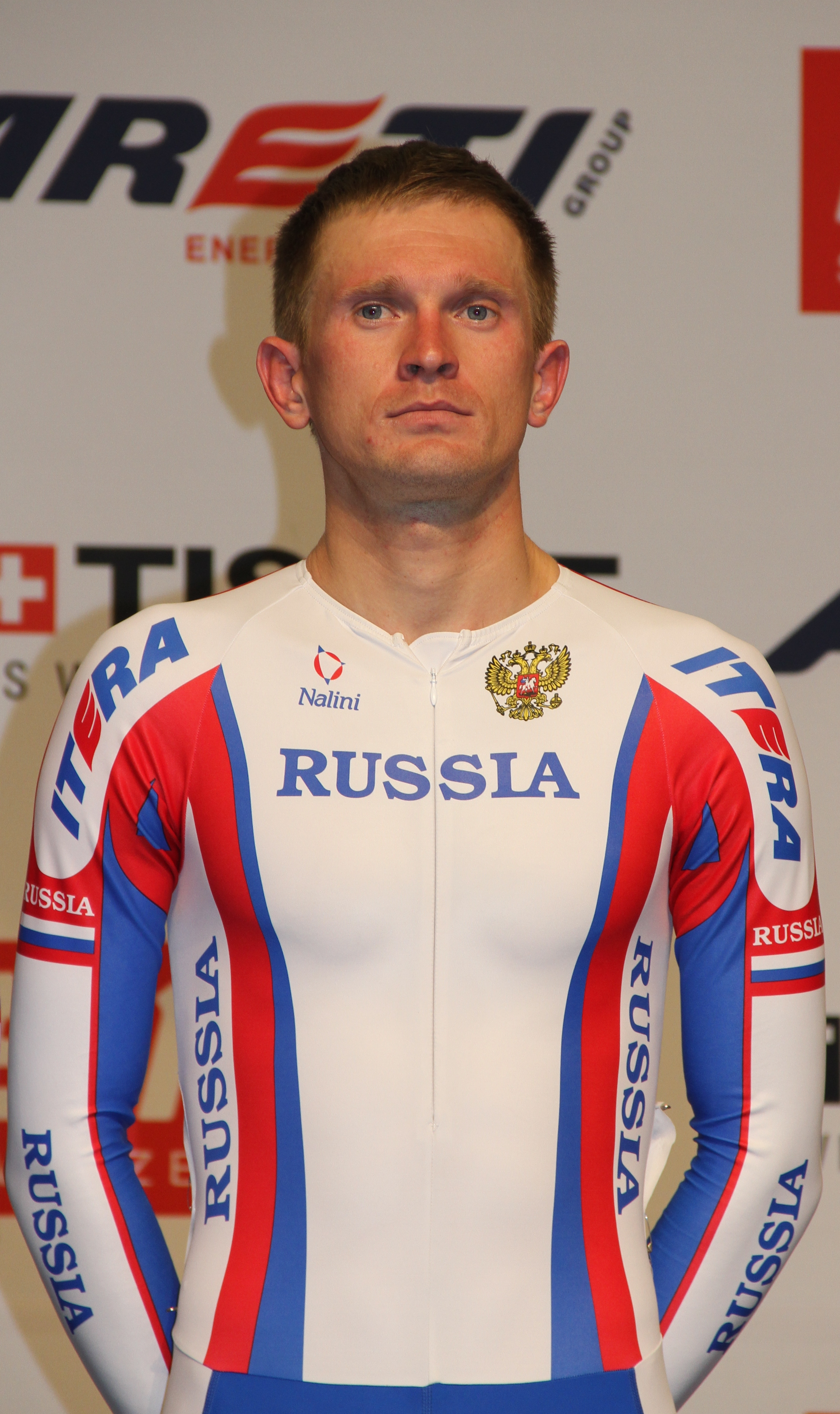 Mikhail Radionov, russ. Radsportlerin The making of this document was supported by the Community-Budget of Wikimedia Germany.